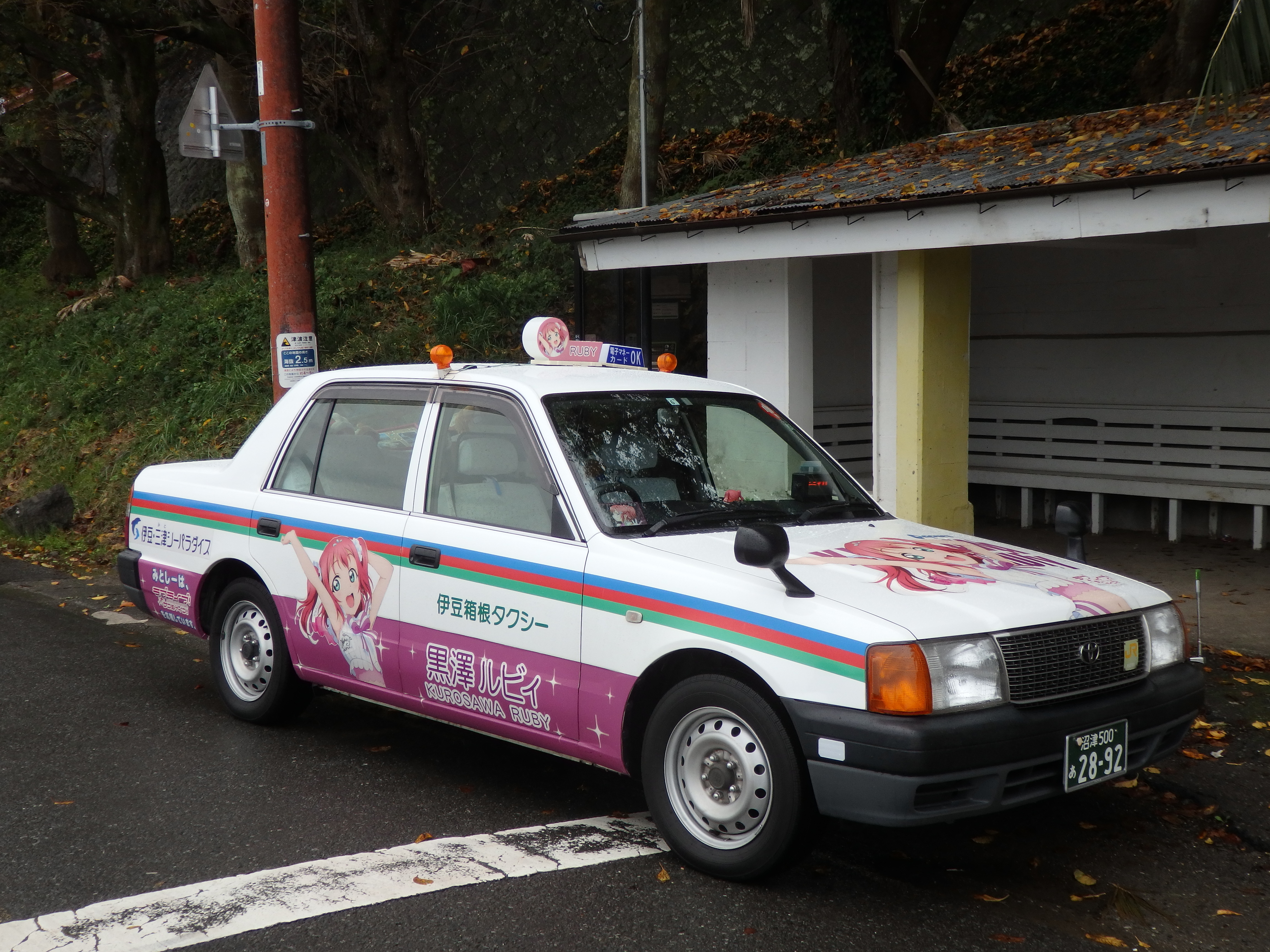 伊豆箱根交通沼津大岡営業所所属のコンフォート